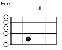 Eigenanfertigung